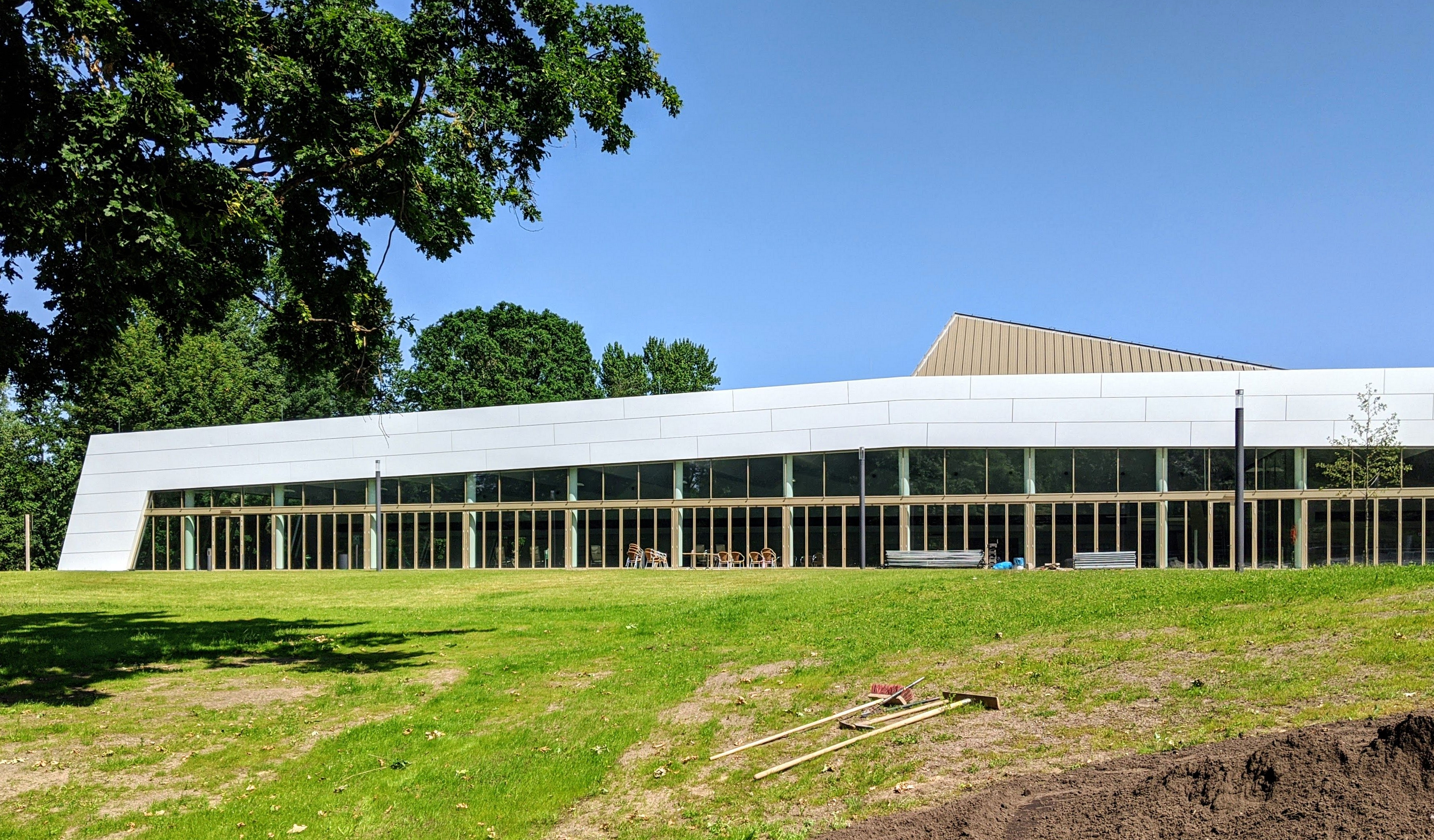 Familienbad Ohlsdorf: neues Hallenbad mit gläserner Südfassade, die vollständig zur Liegewiese hin geöffnet werden kann